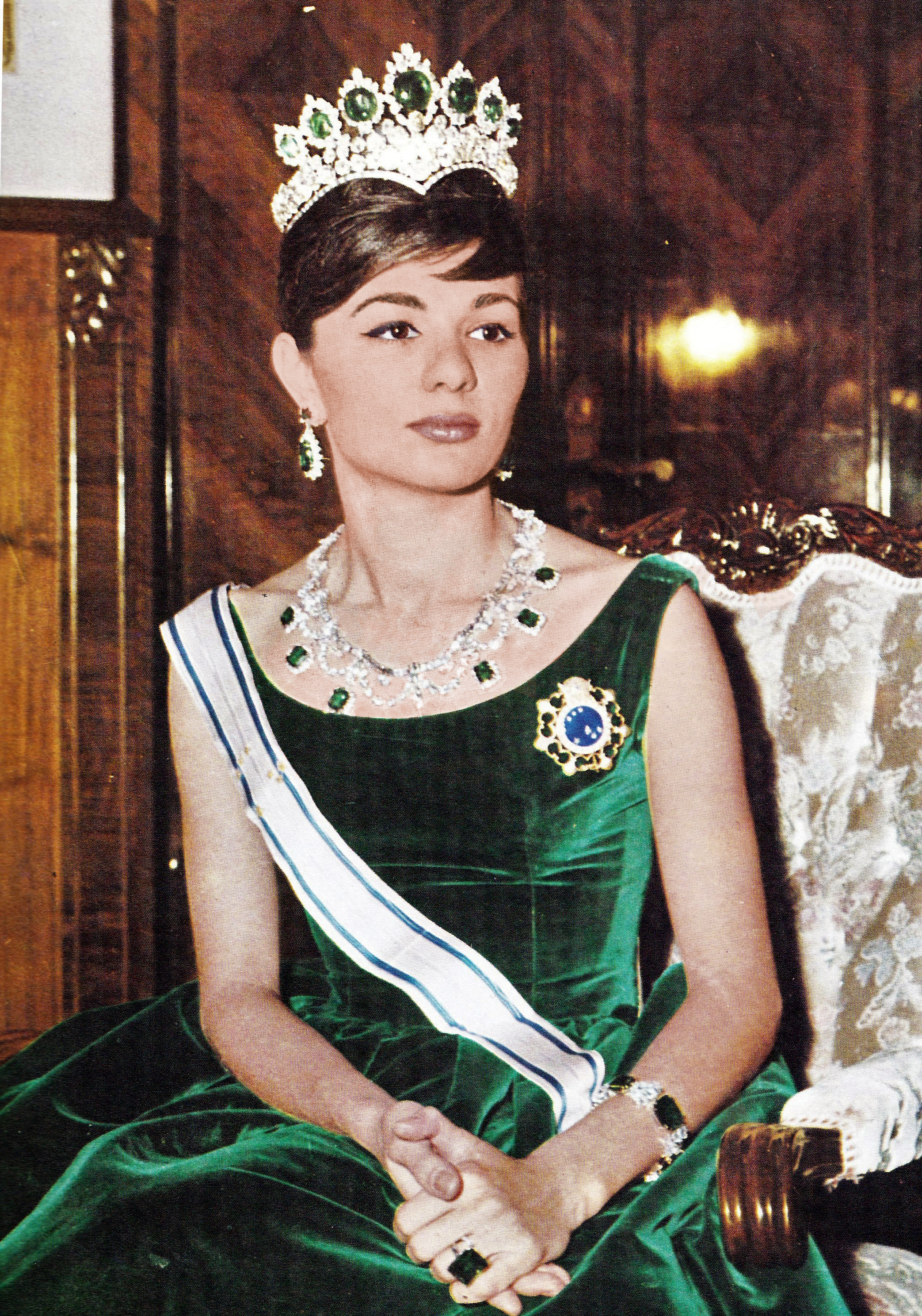 Portrait officiel de la reine Farah Pahlavi